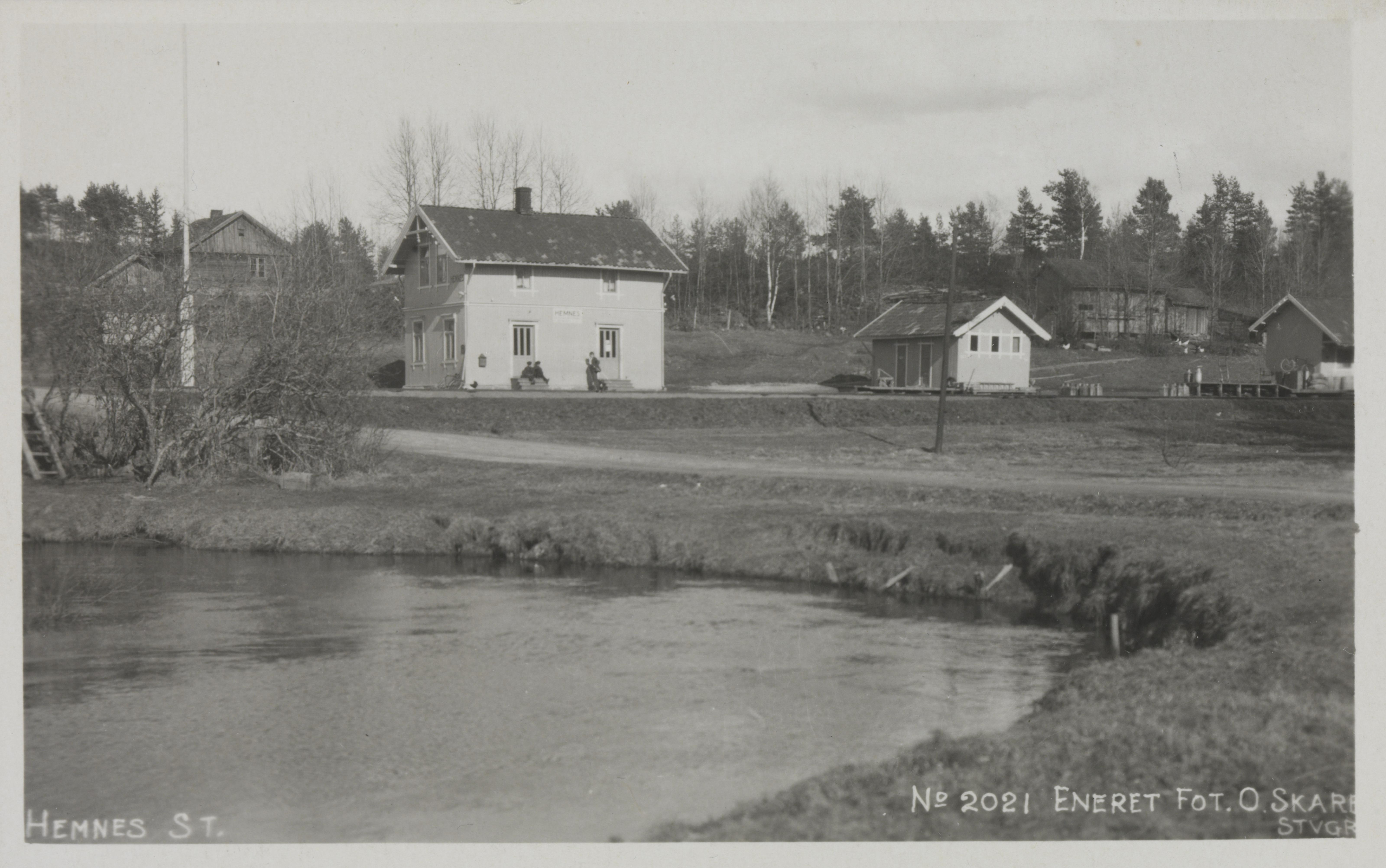 Bildet er hentet fra Nasjonalbibliotekets bildesamling Hemnes,Hemnes stasjon, Aurskog-Høland, Akershus